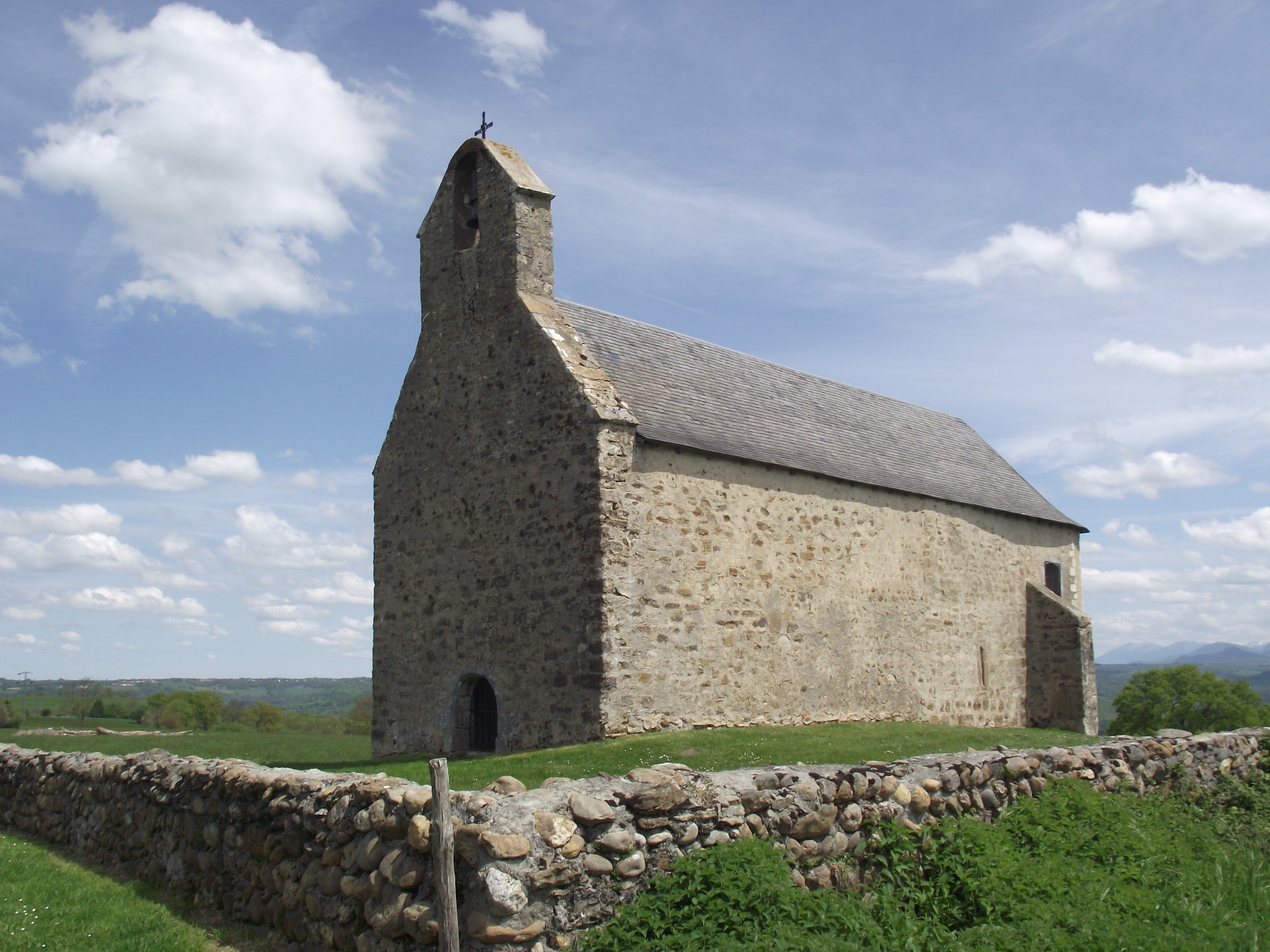 Chapelle de Roumé (Cieutat, Hautes-Pyrénées, France)